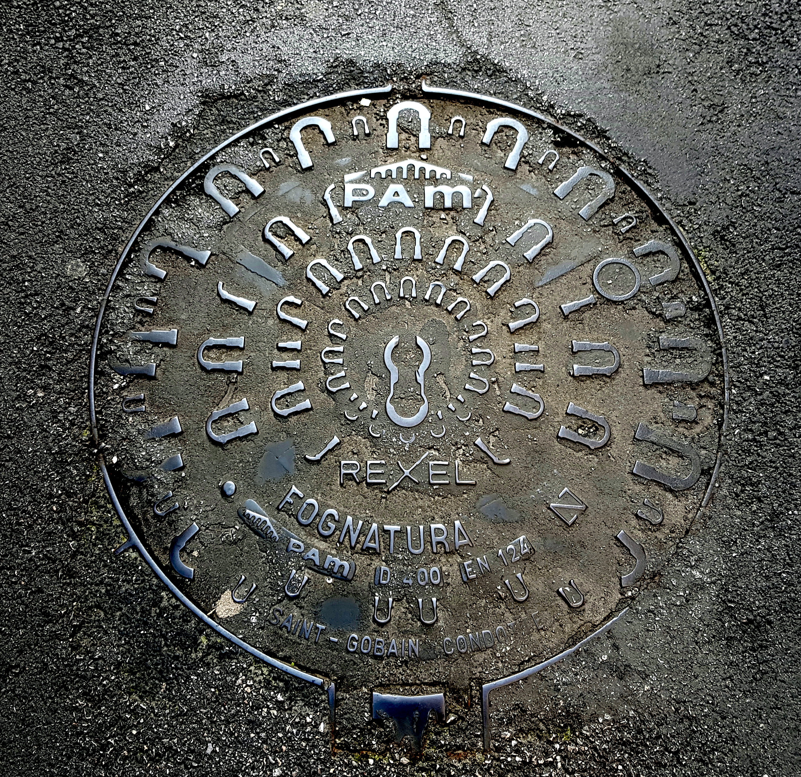 Plaque d'égout Pont-à-Mousson à Padoue, via San Gaetano